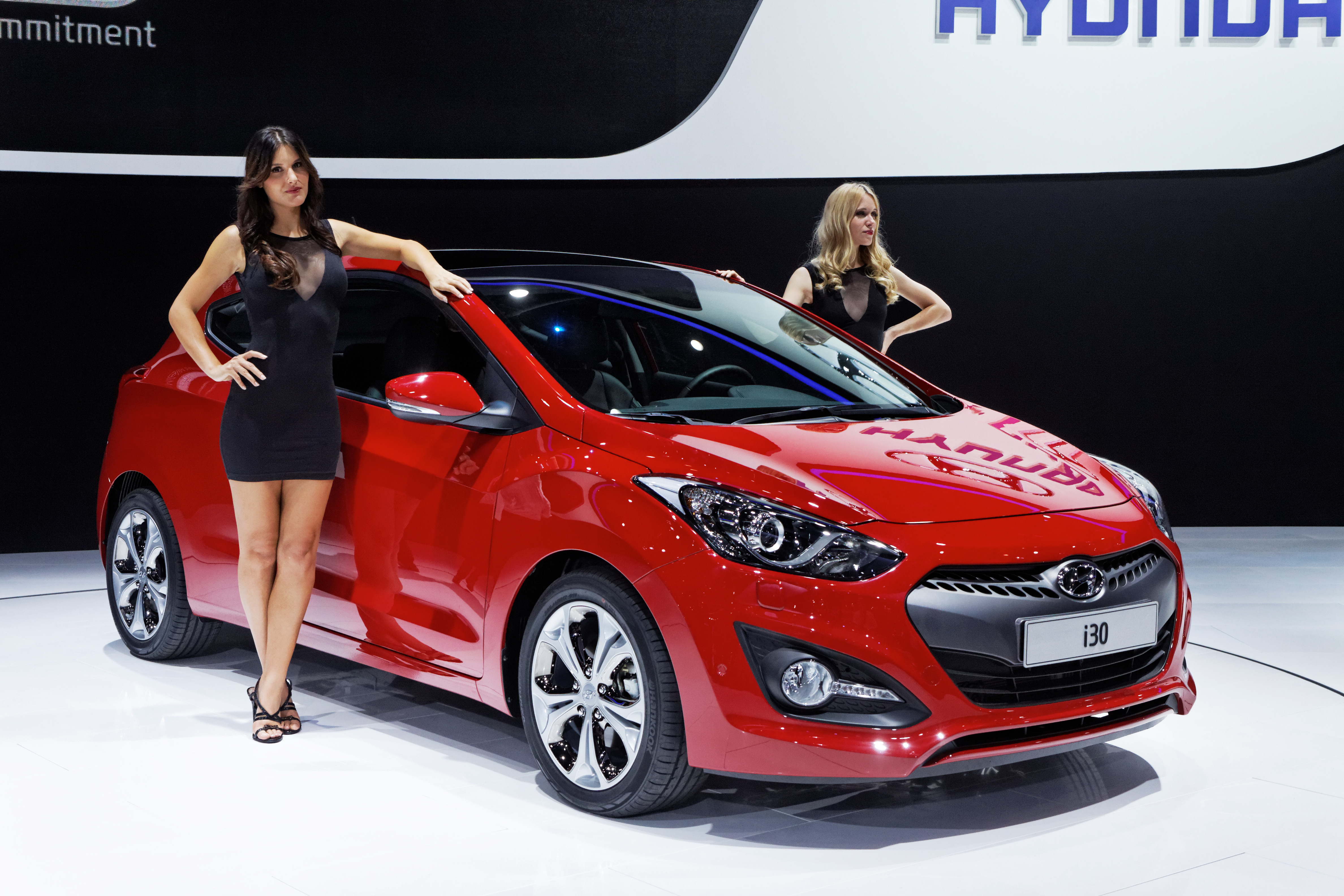 Une Hyundai i30 présentée lors du Mondial de l'Automobile de Paris 2012.